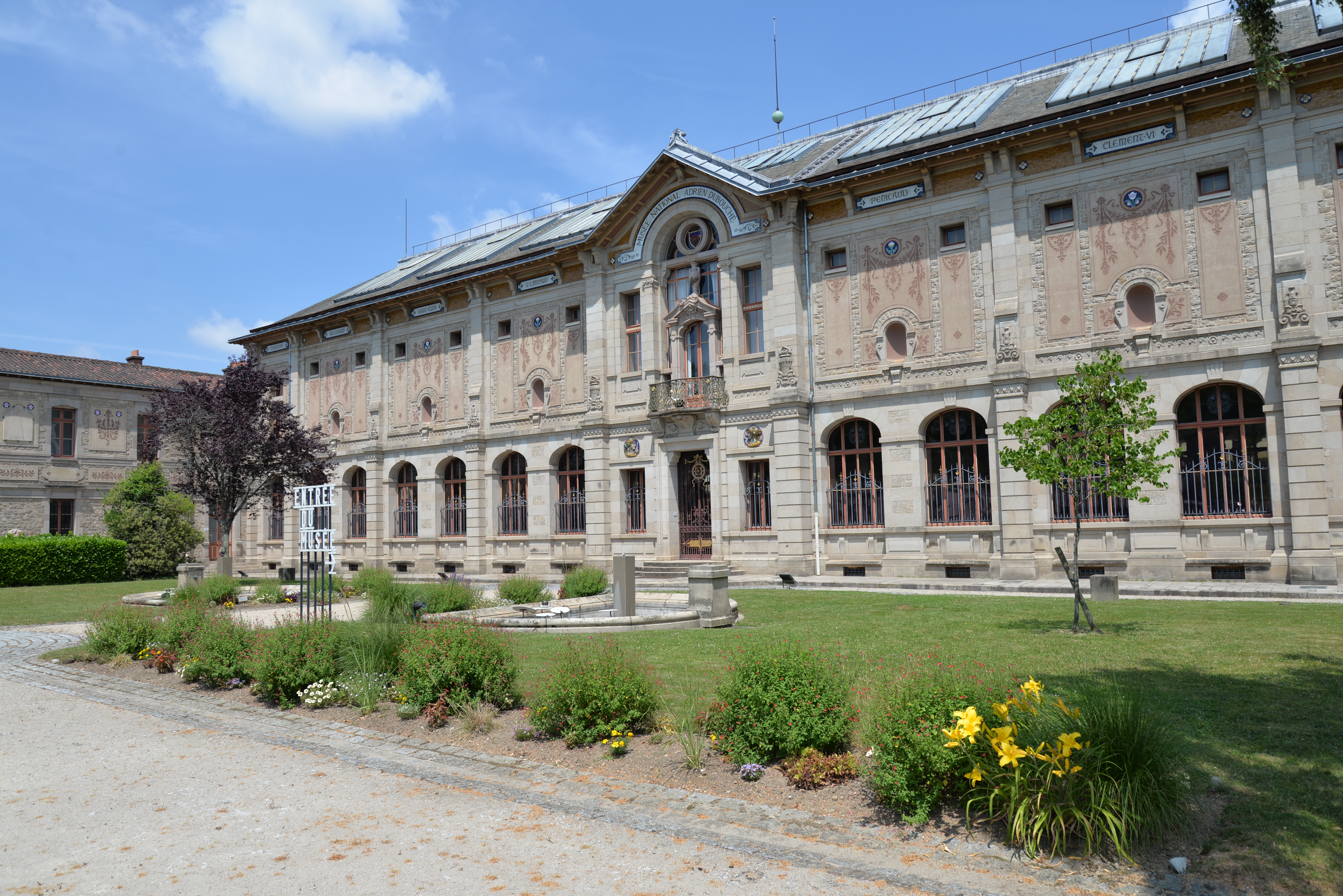 Musée national de la porcelaine Adrien Dubouché